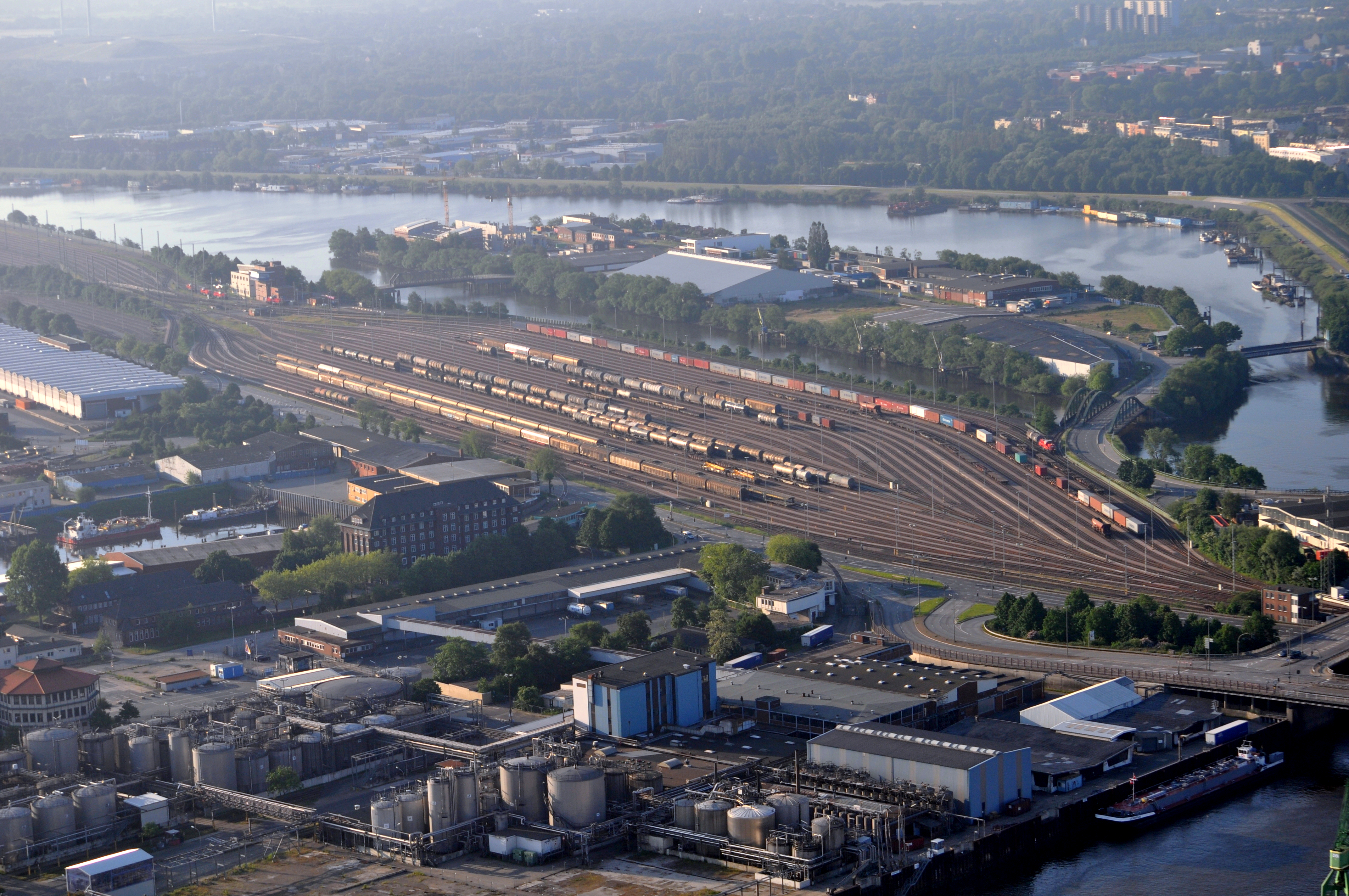 Hafenbahnhof Hamburg Süd in Hamburg-Kleiner Grasbrook, dahinter der Spreehafen.